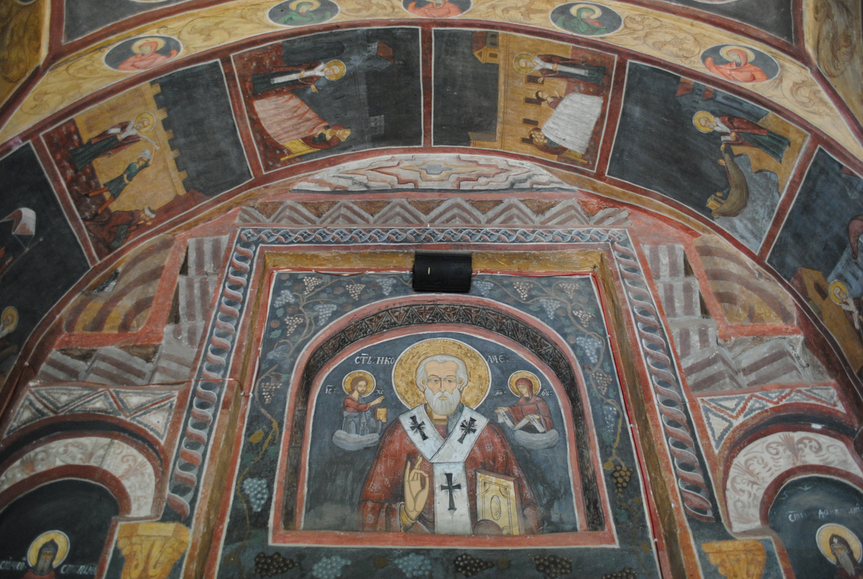 Biserica "Sf. Nicolae"-Porcești, 1653,1827 - 1828; refaceri sec. XX